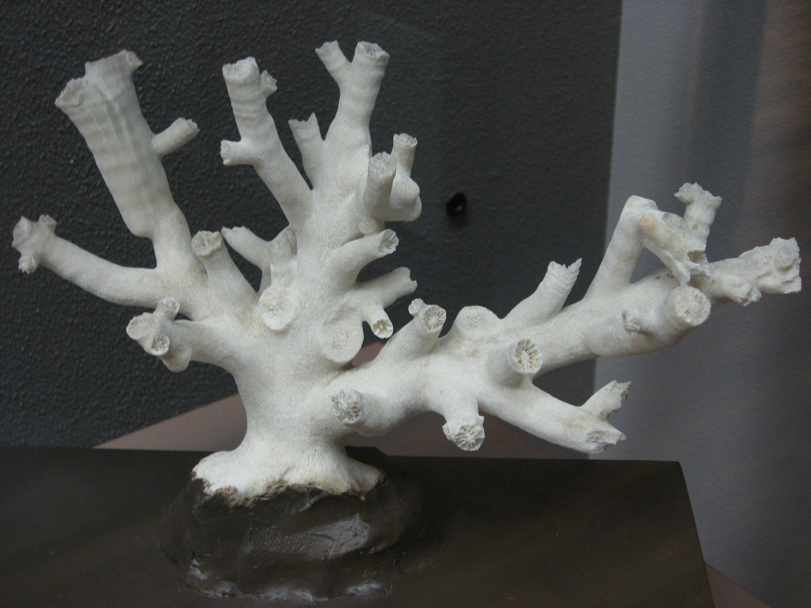 Dendrophyllia ramea in Muséum-aquarium de Nancy Map: 48° 41' 41" N 6° 11' 18" E